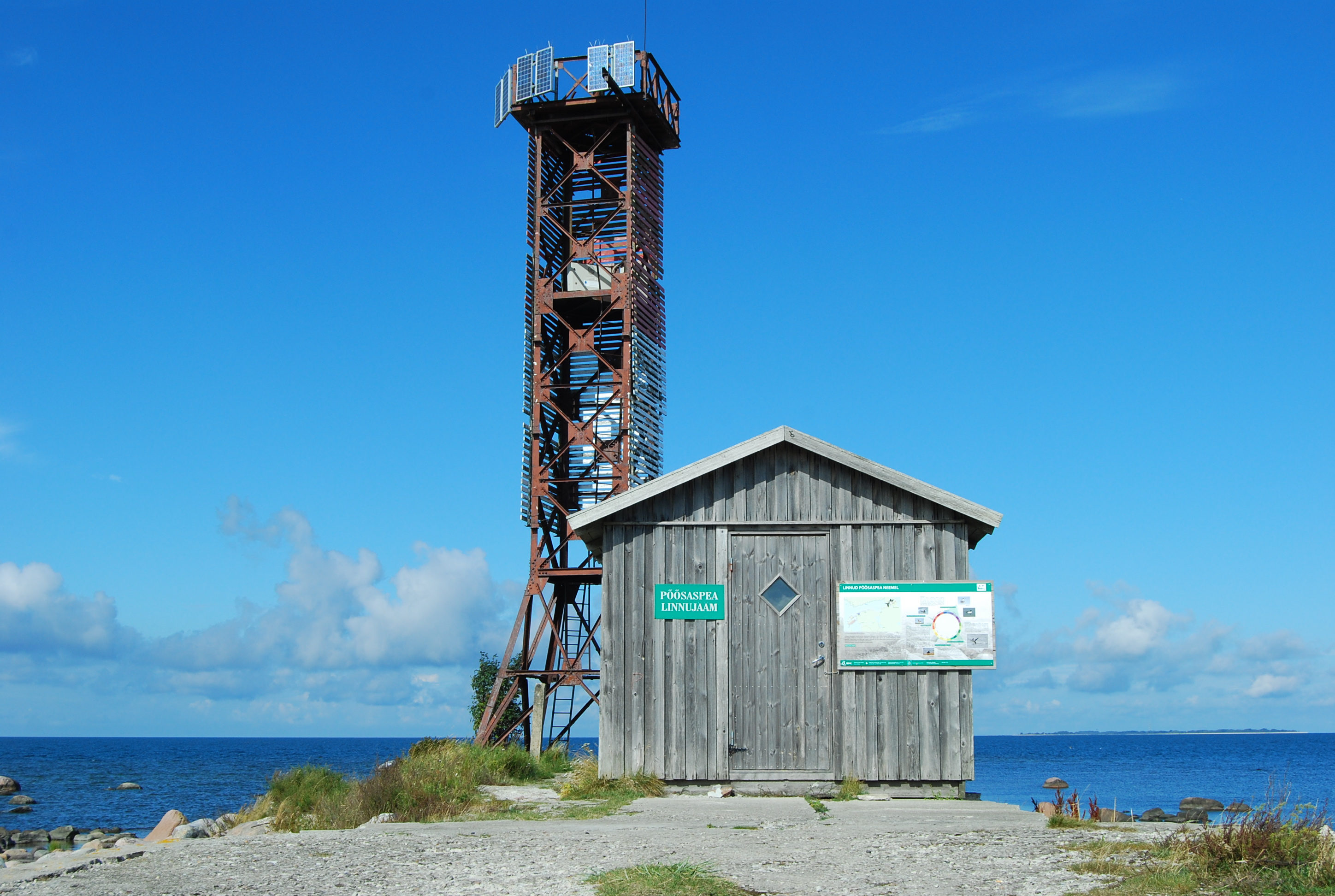 Põõsaspea neeme linnuvaatlustorn